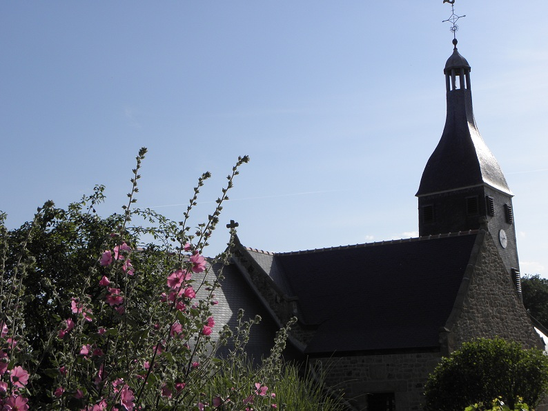 Église Saint-Marc de Saint-Marc-sur-Couesnon (35).